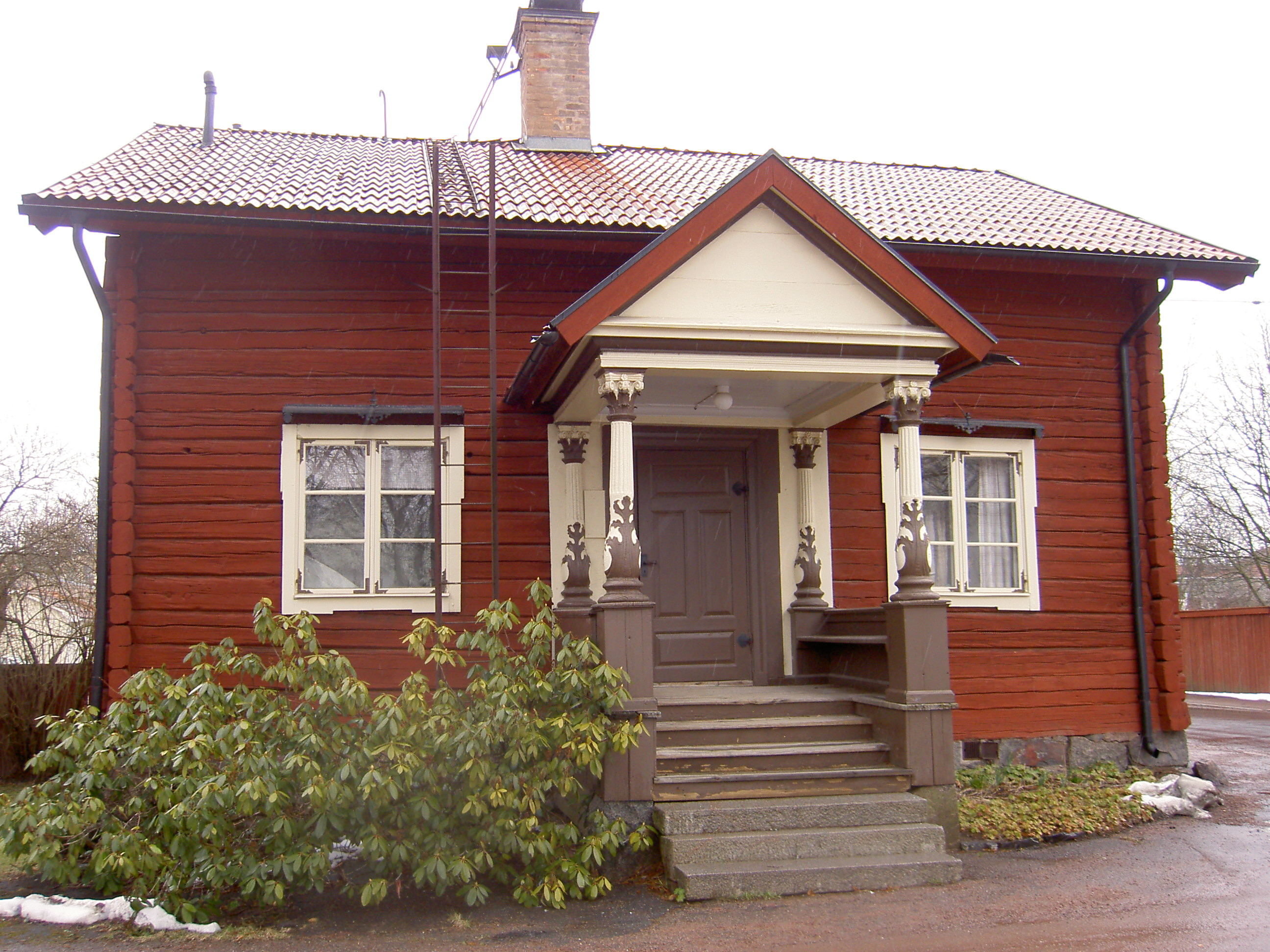 Säters sockenstuga, Säter, Sverige